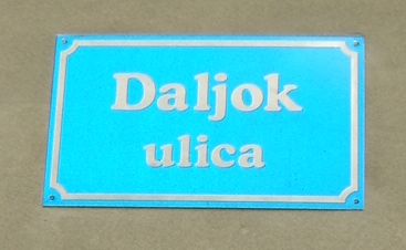 Tabla s nazivom ulice u Baranjskom Petrovom Selu